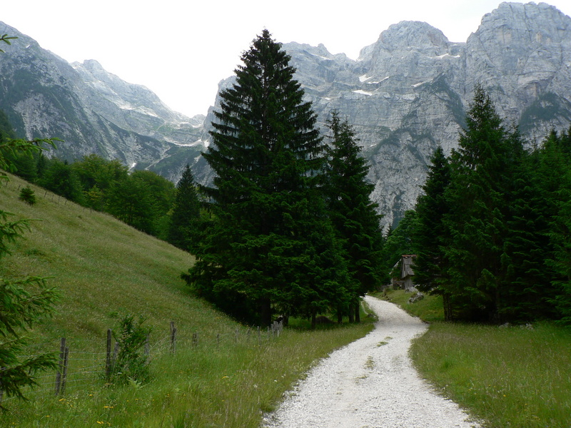 Kanjavec from Zadnjica valley